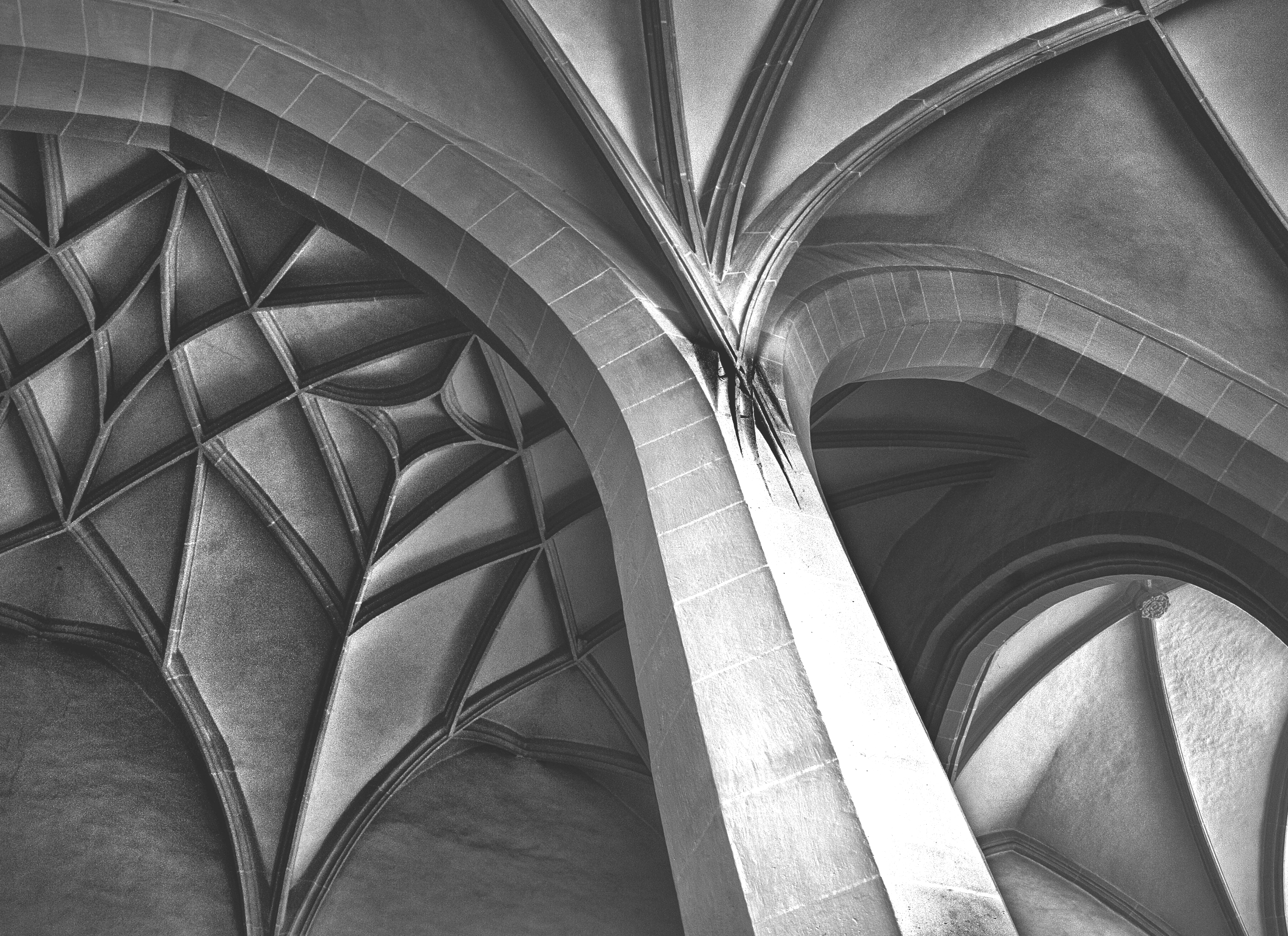 Wallfahrtskirche Maria Laach